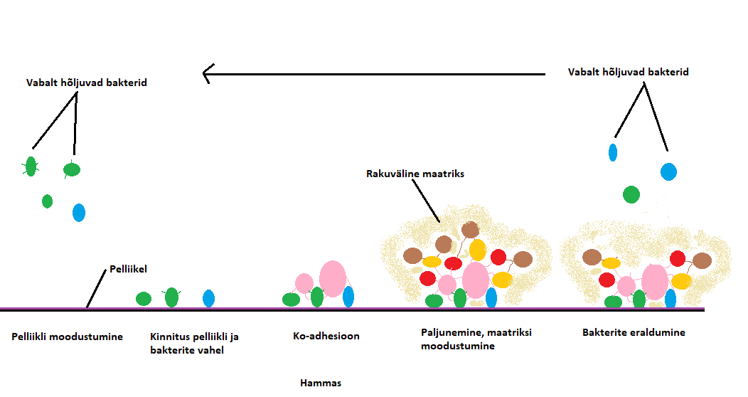 Hambakatu moodustumine